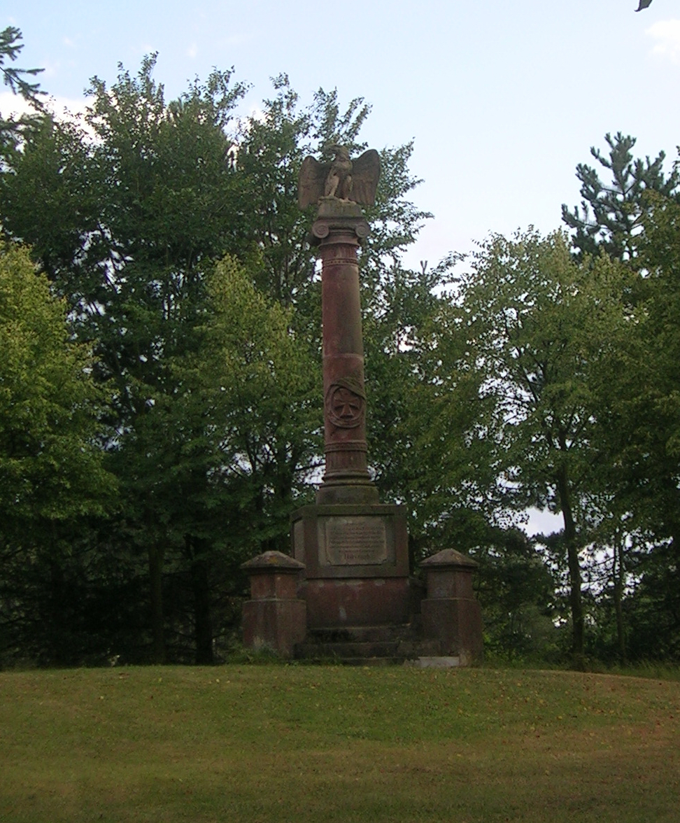 Denkmal für die im Deutsch-Französischen Krieg gefallenen Soldaten